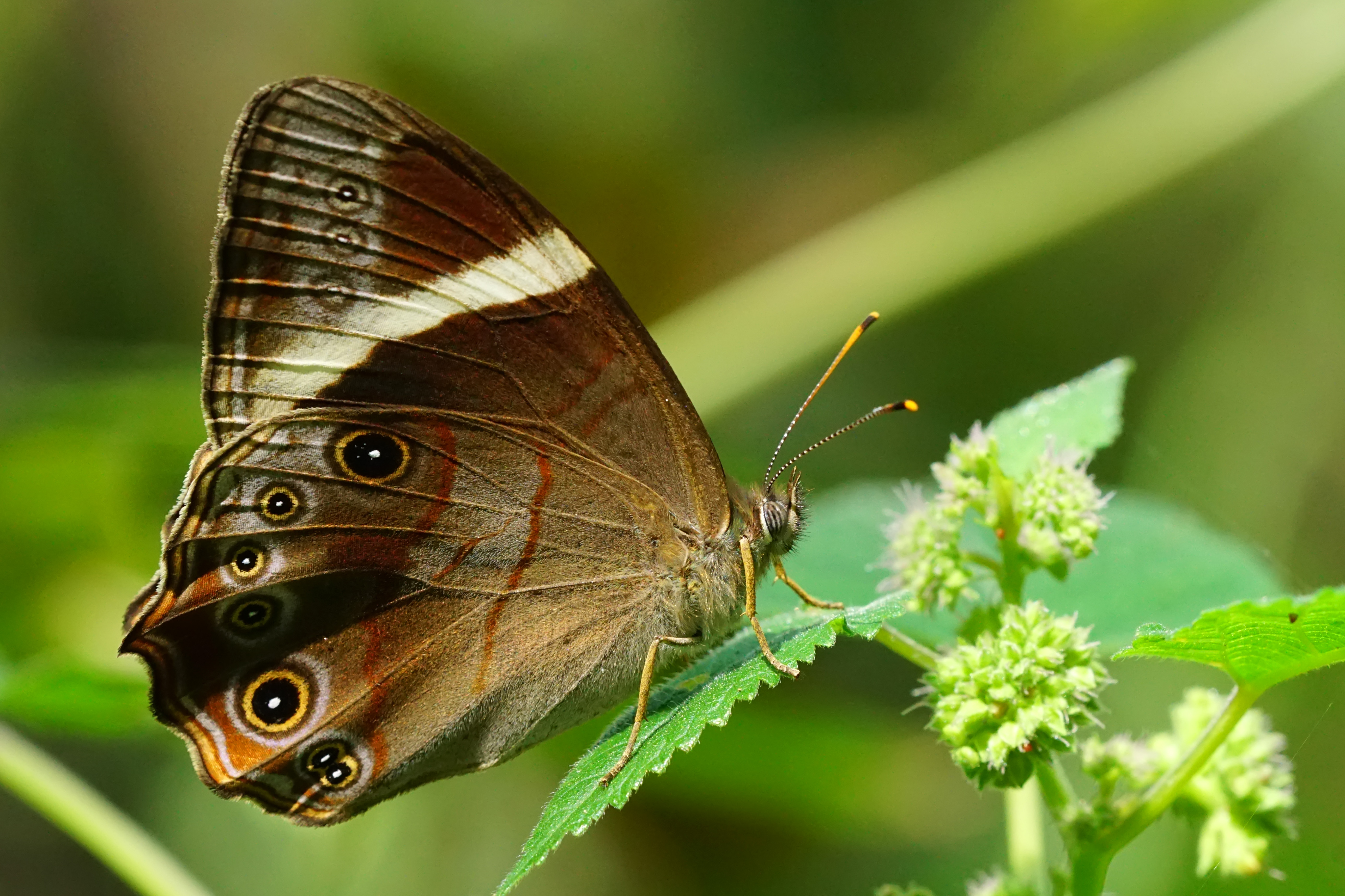 深山黛眼蝶 Lethe insana formosana